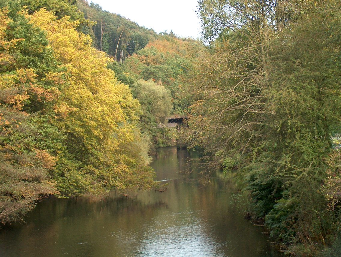 Wupper bei Radevormwald-Vogelsmühle Das Bild zeigt die Wupper bei Radevormwald-Vogelsmühle, im Hintergrund die Eisenbahnbrücke zwischen Dahlerau und Dahlhausen Fotograf: Christoph Grimlowski (Benutzer Grimmi59_rade - eigene Aufnahme) Datum: September 2004